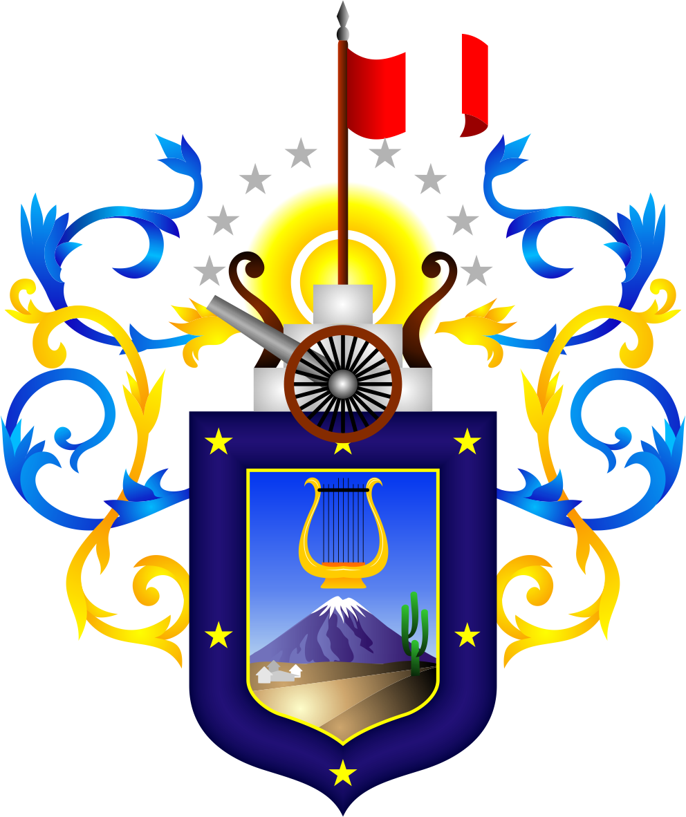 Distrito de Mariano Melgar